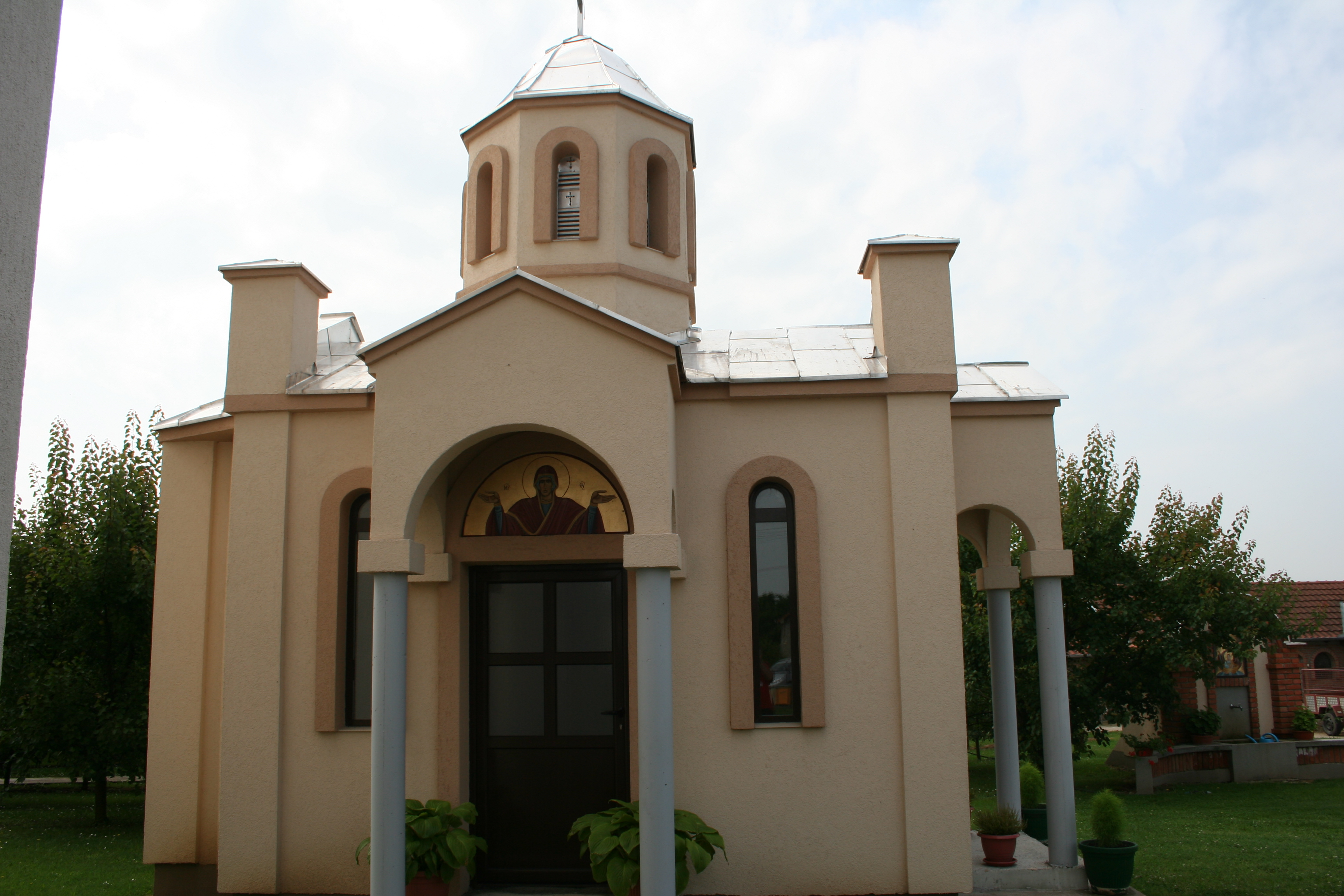 Crkva Svete Trojice u Zasavici II